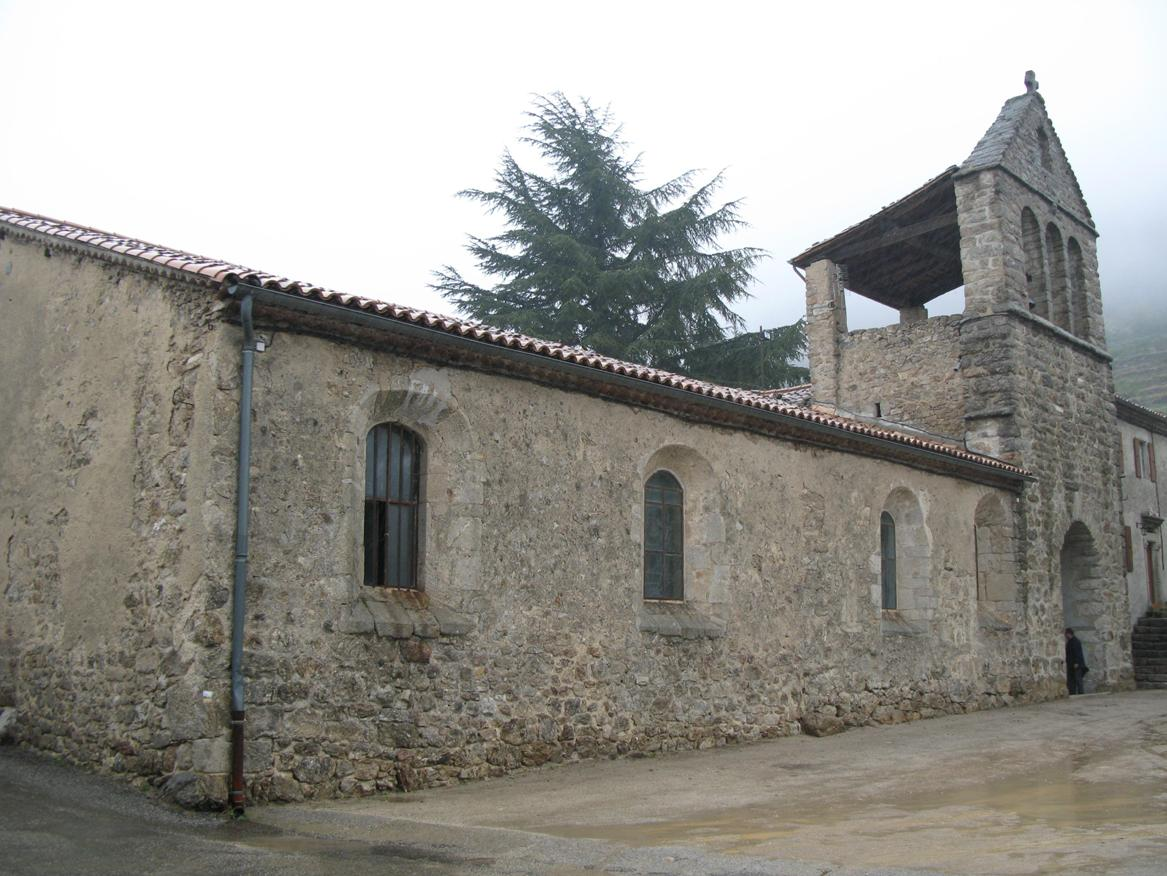 Village de Laboule (Ardèche)